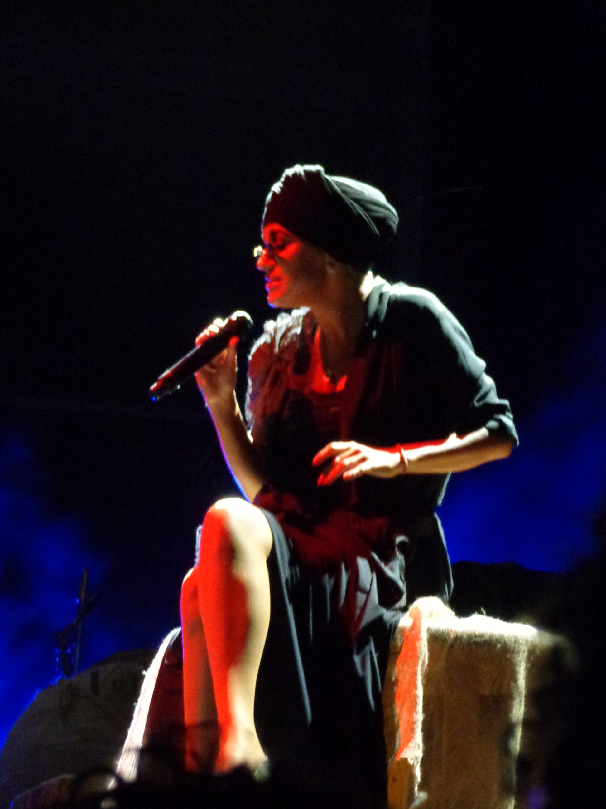 Melody Gardot no cascais Music Festival, Portugal 2012. Melody Gardot at cascais Music Festival, Portugal 2012